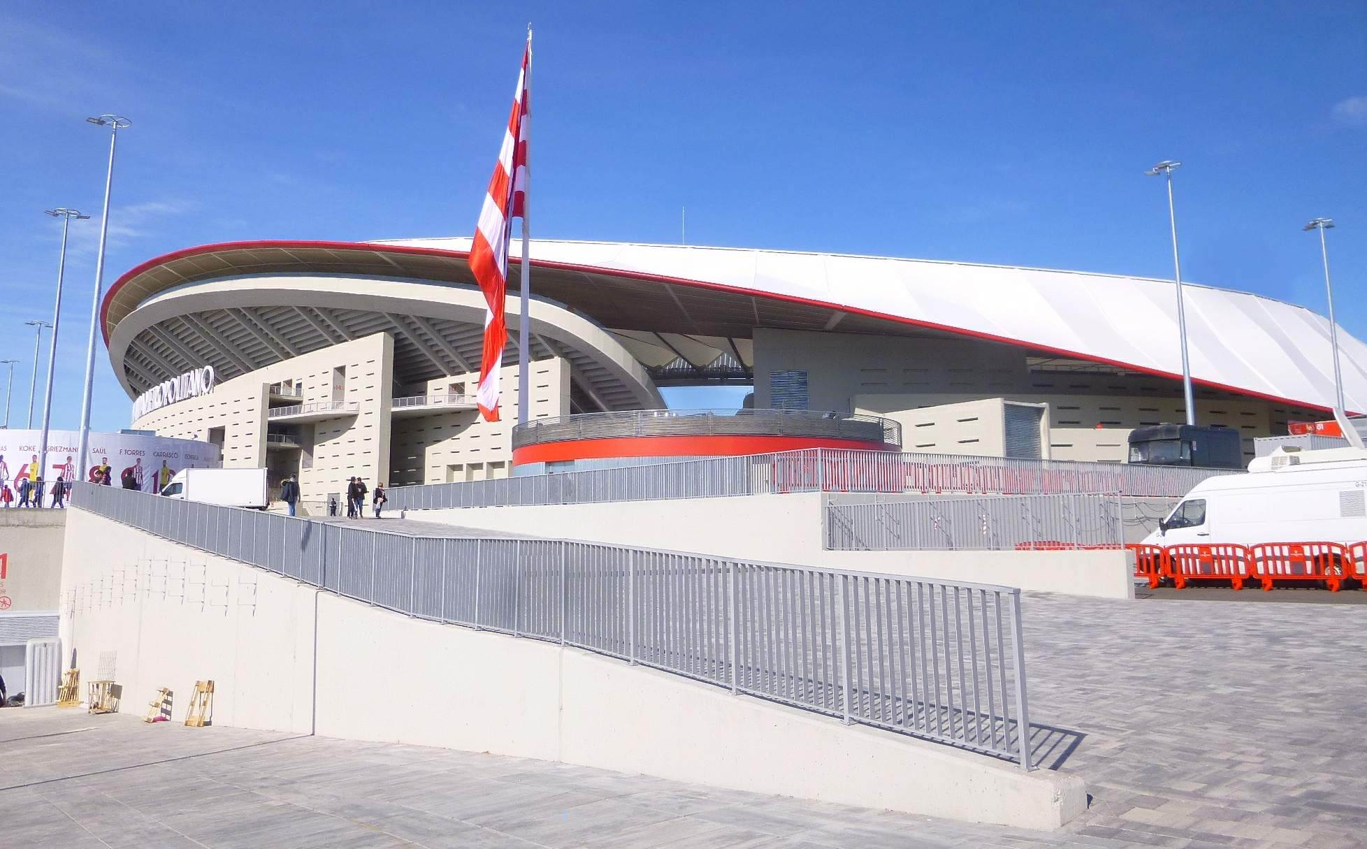 Estadio Wanda Metropolitano (Madrid)